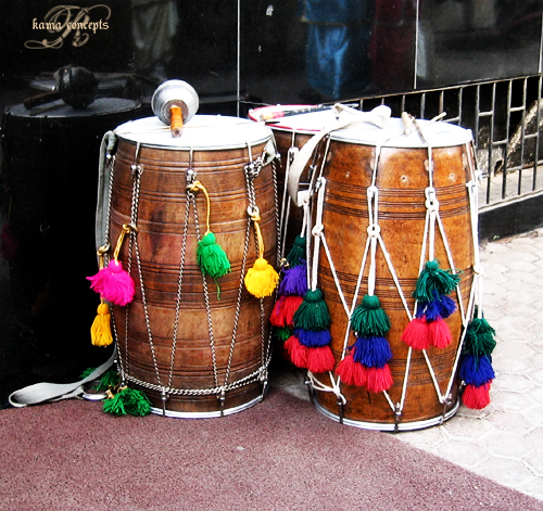 Drums